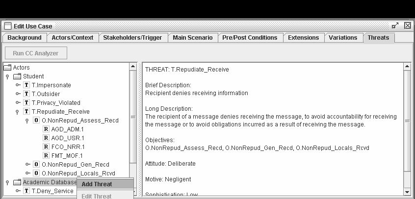 copie ecran ccarch